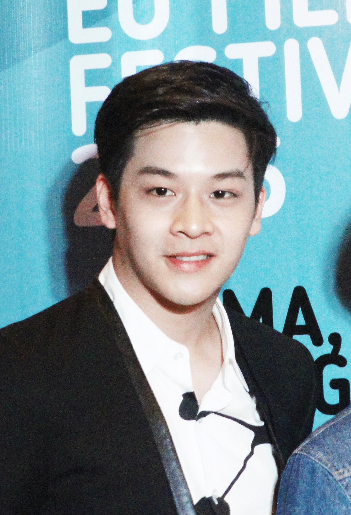 © Cancanisstory This photo is my copyright.